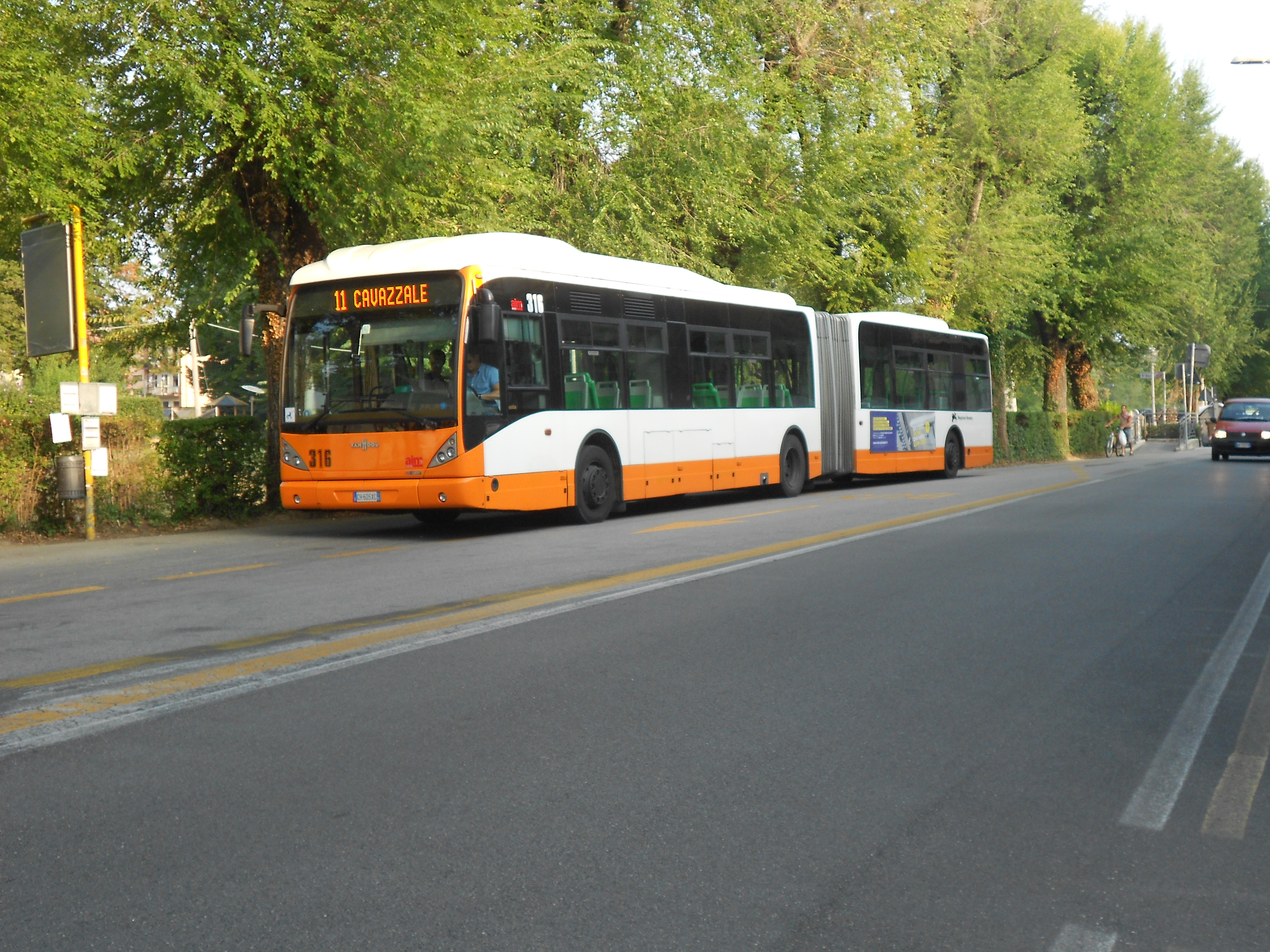 VanHool AG300 New di AIM Vicenza